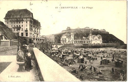 Carte postale ancienne de la plage de Granville